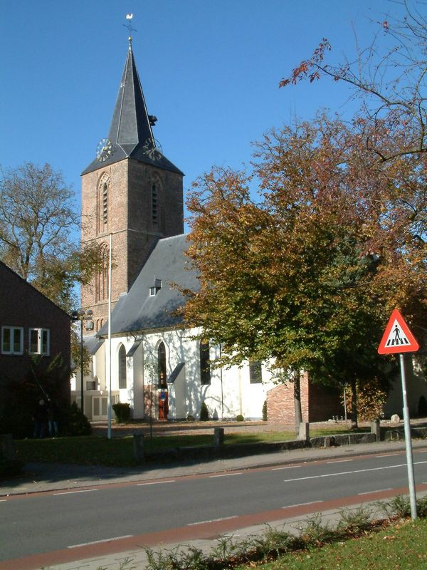 Eigen Opname